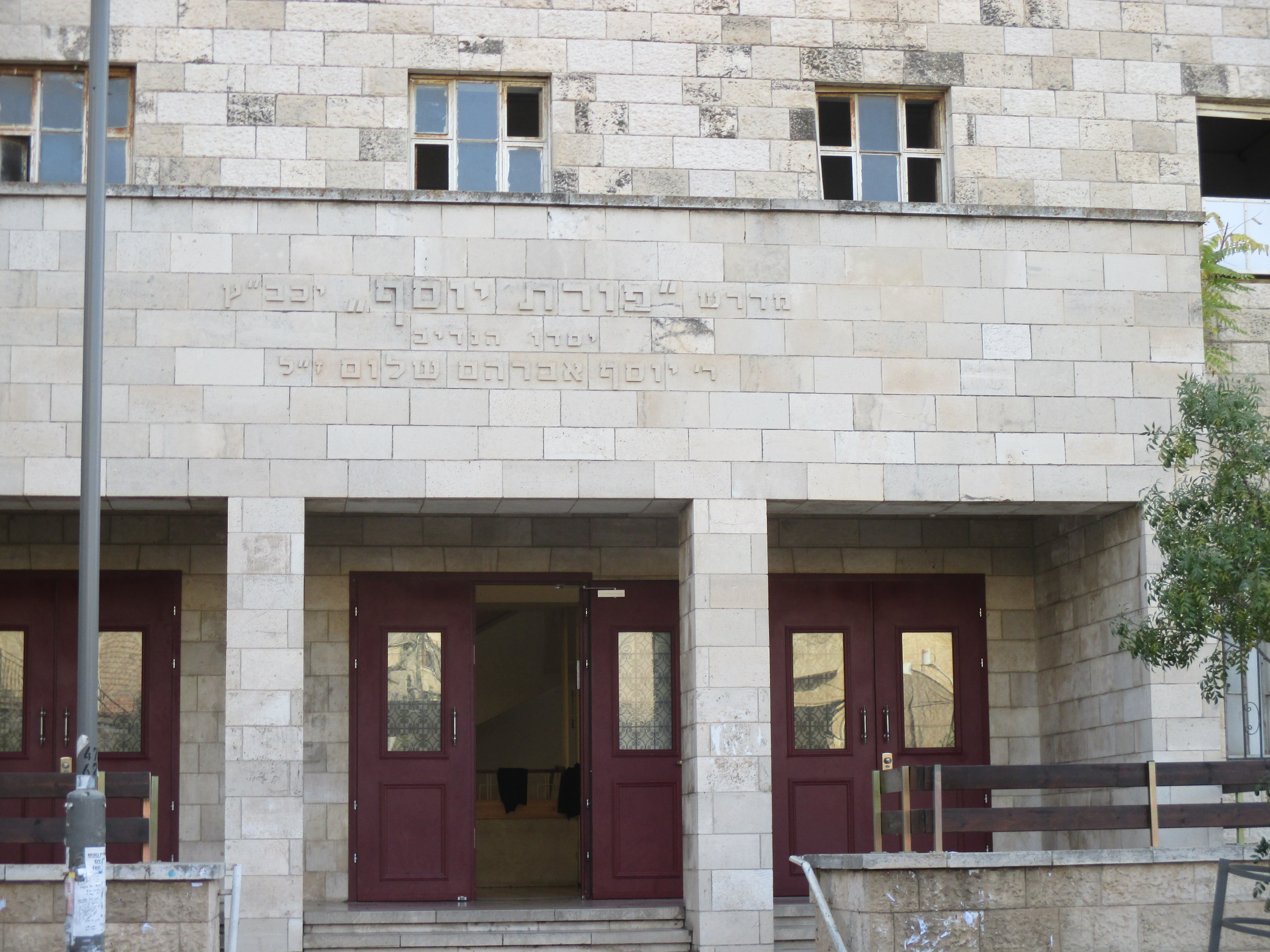 ישיבת פורת יוסף גאולה בירושלים